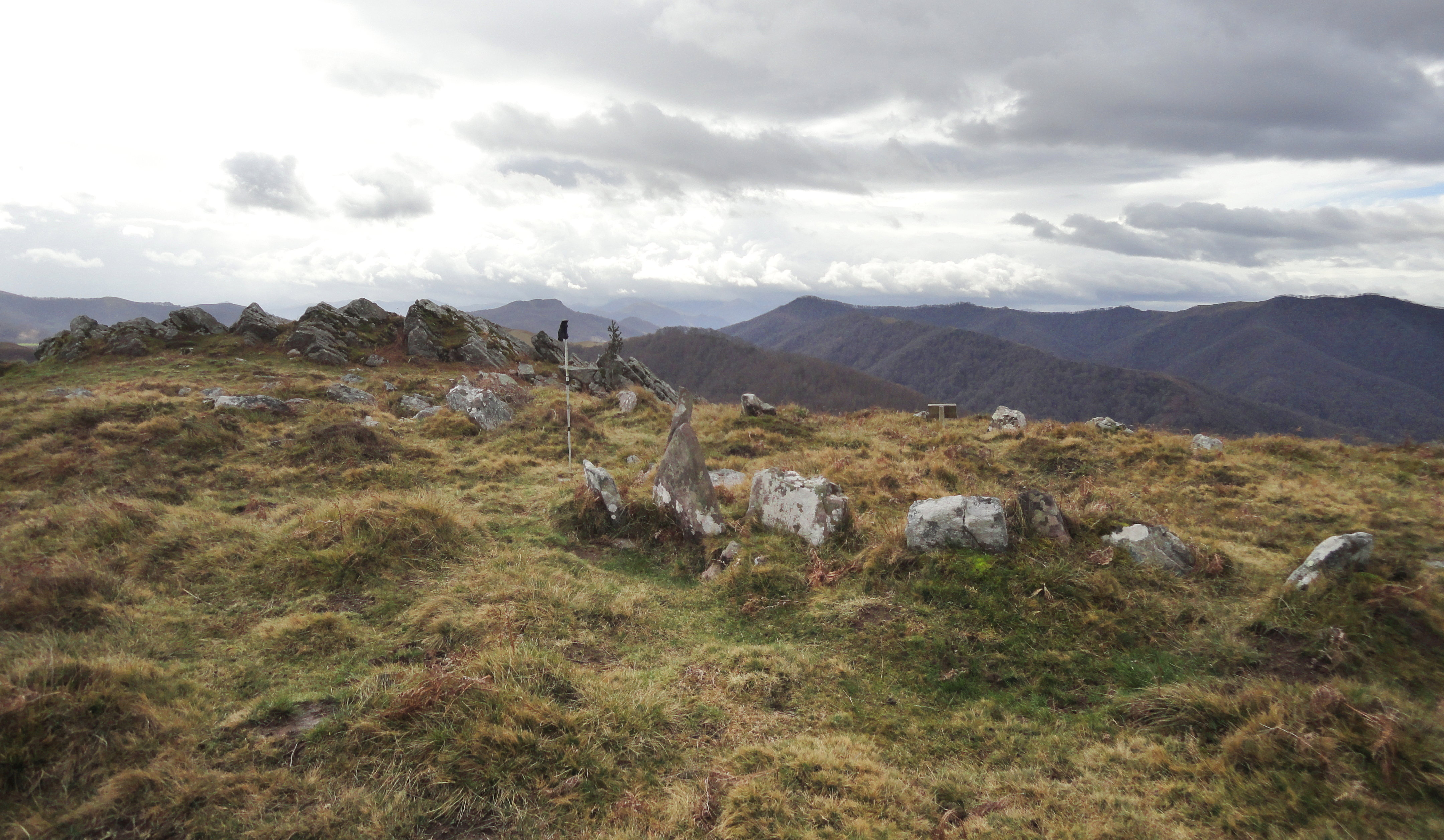 Altsoroi harrespilak - Etxalar